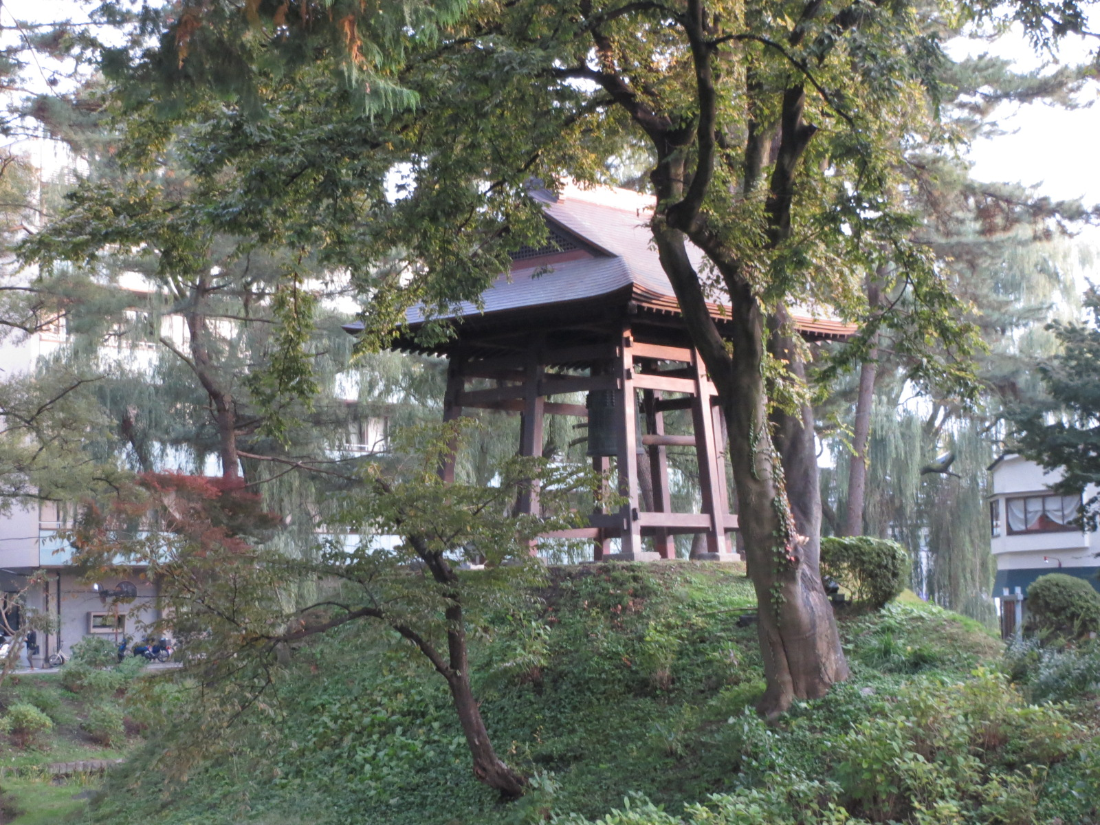 盛岡城跡公園内にある時鐘